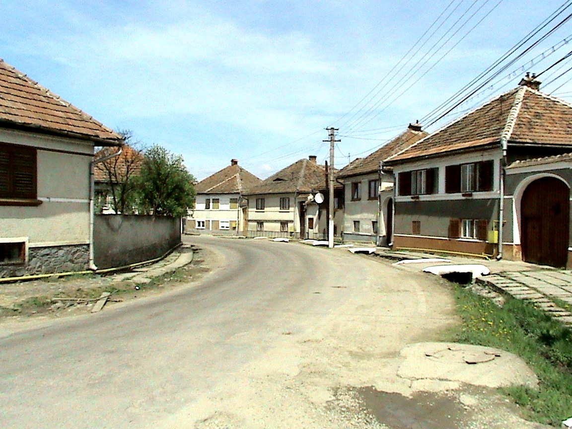 Ulița Donului în curbă, din Racovița, Sibiu